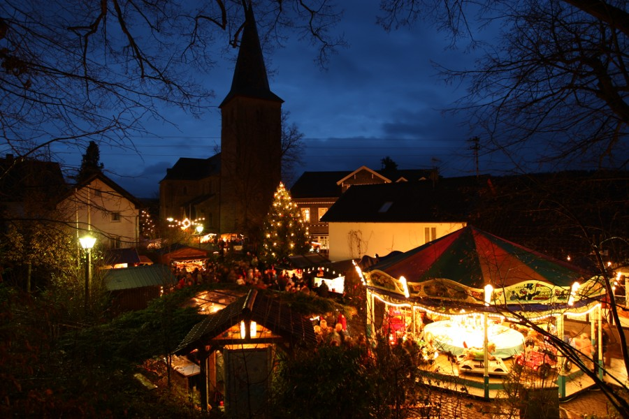 Döörper Weihnacht Ruppichteroth 2009